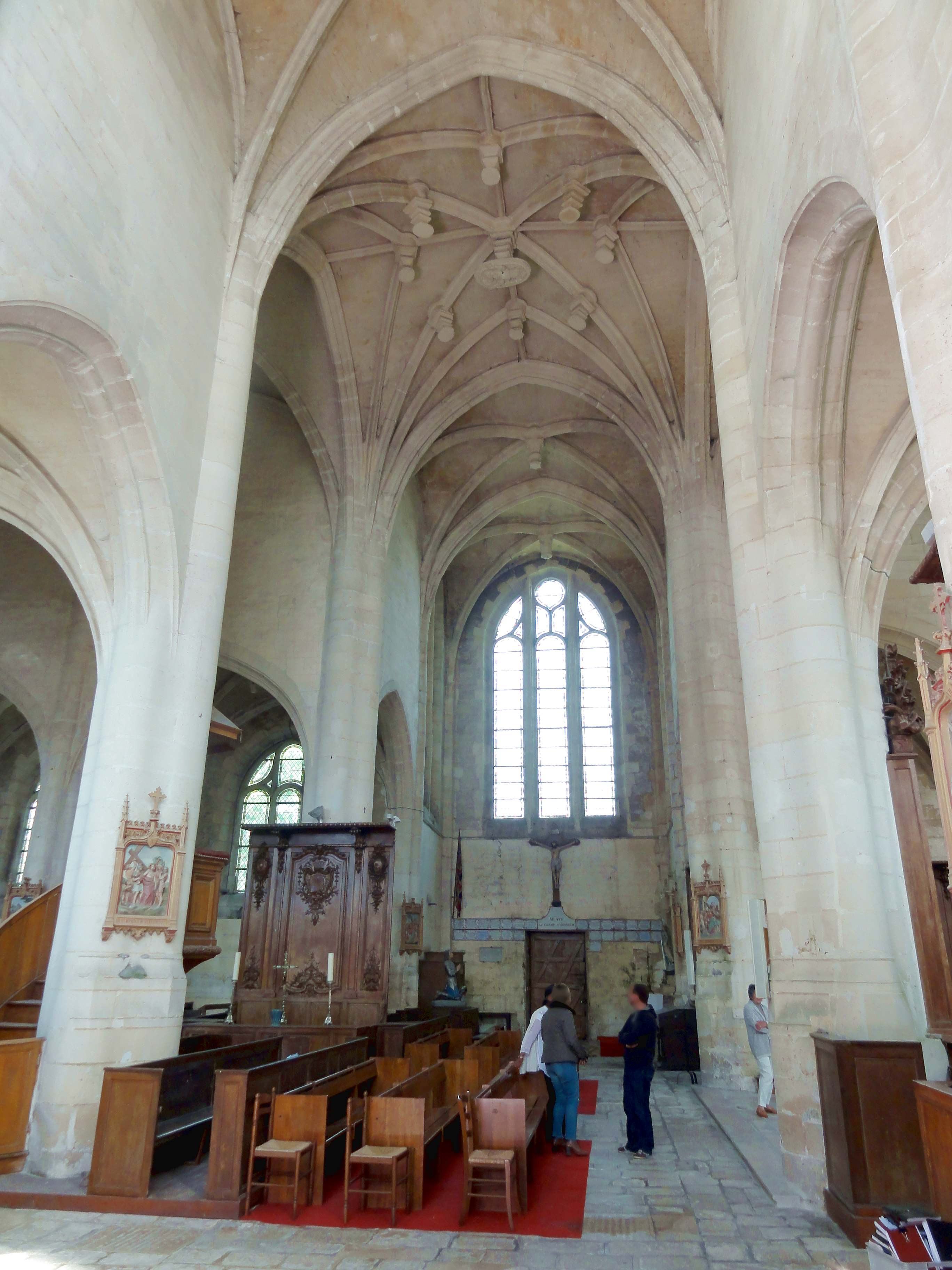 Intérieur de l'église (voir titre).